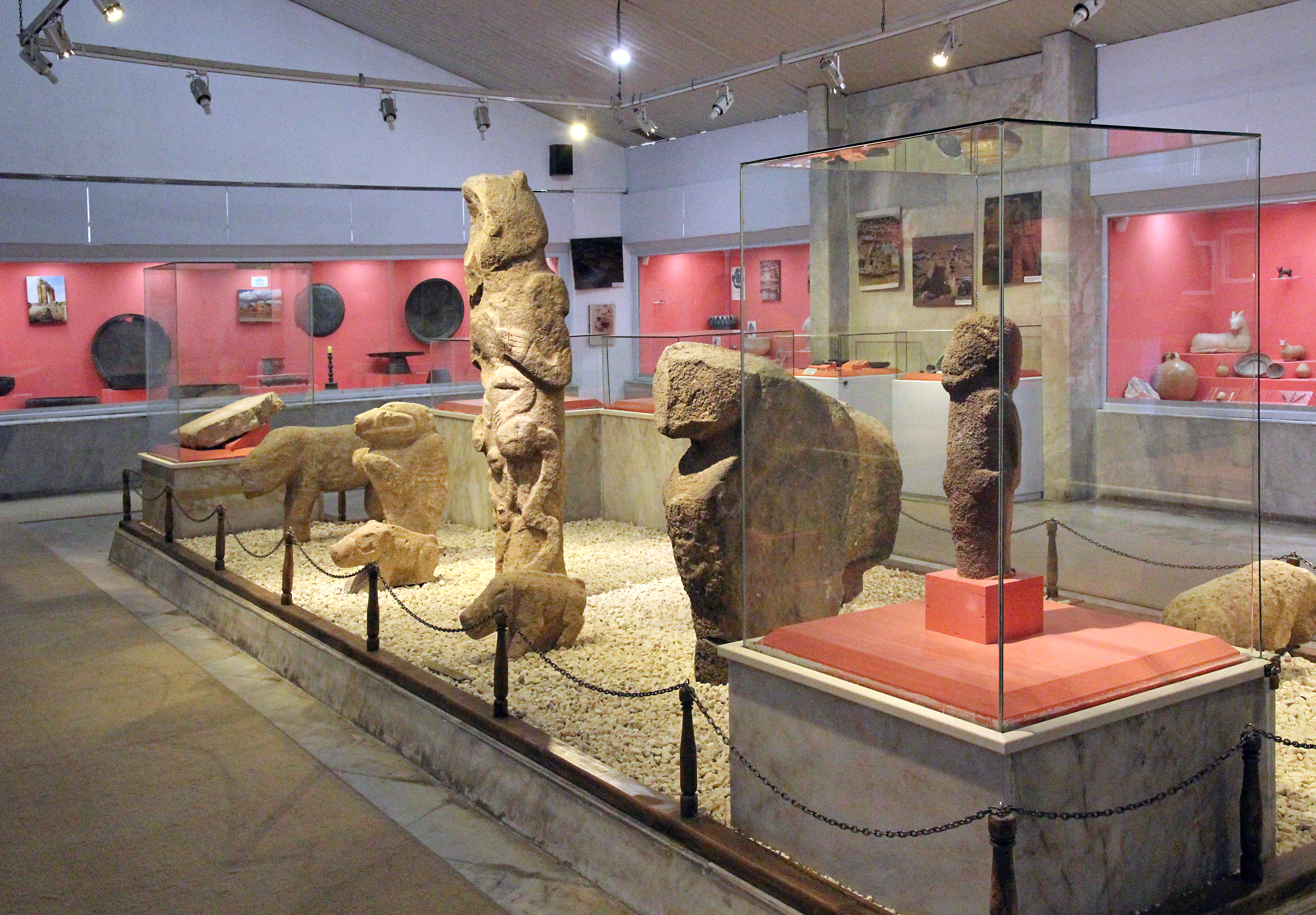 Archäologisches Museum Şanlıurfa, Südosttürkei, Stelen und Skulpturen aus Göbekli Tepe